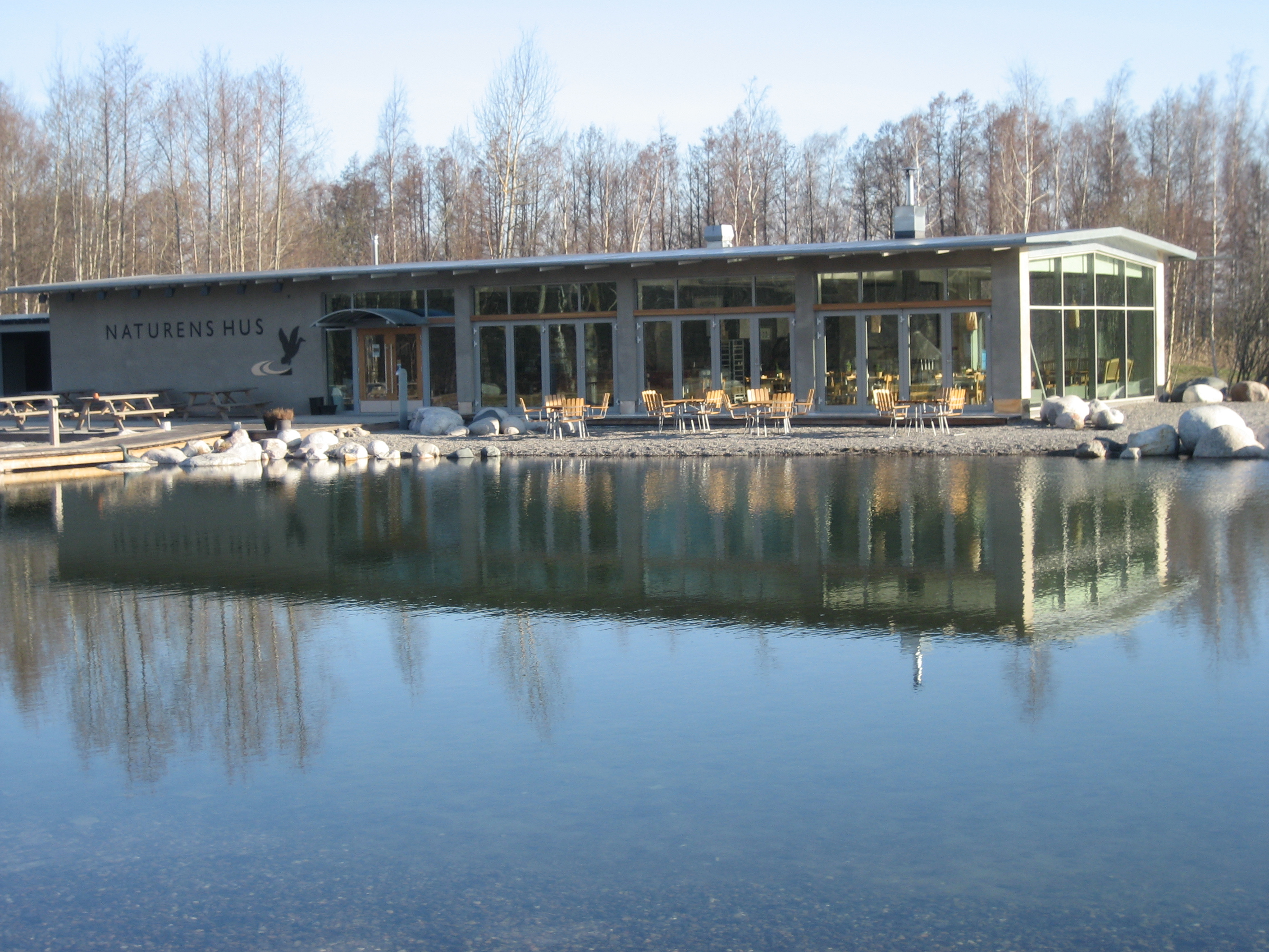 Naturens Hus, Örebro, Sweden